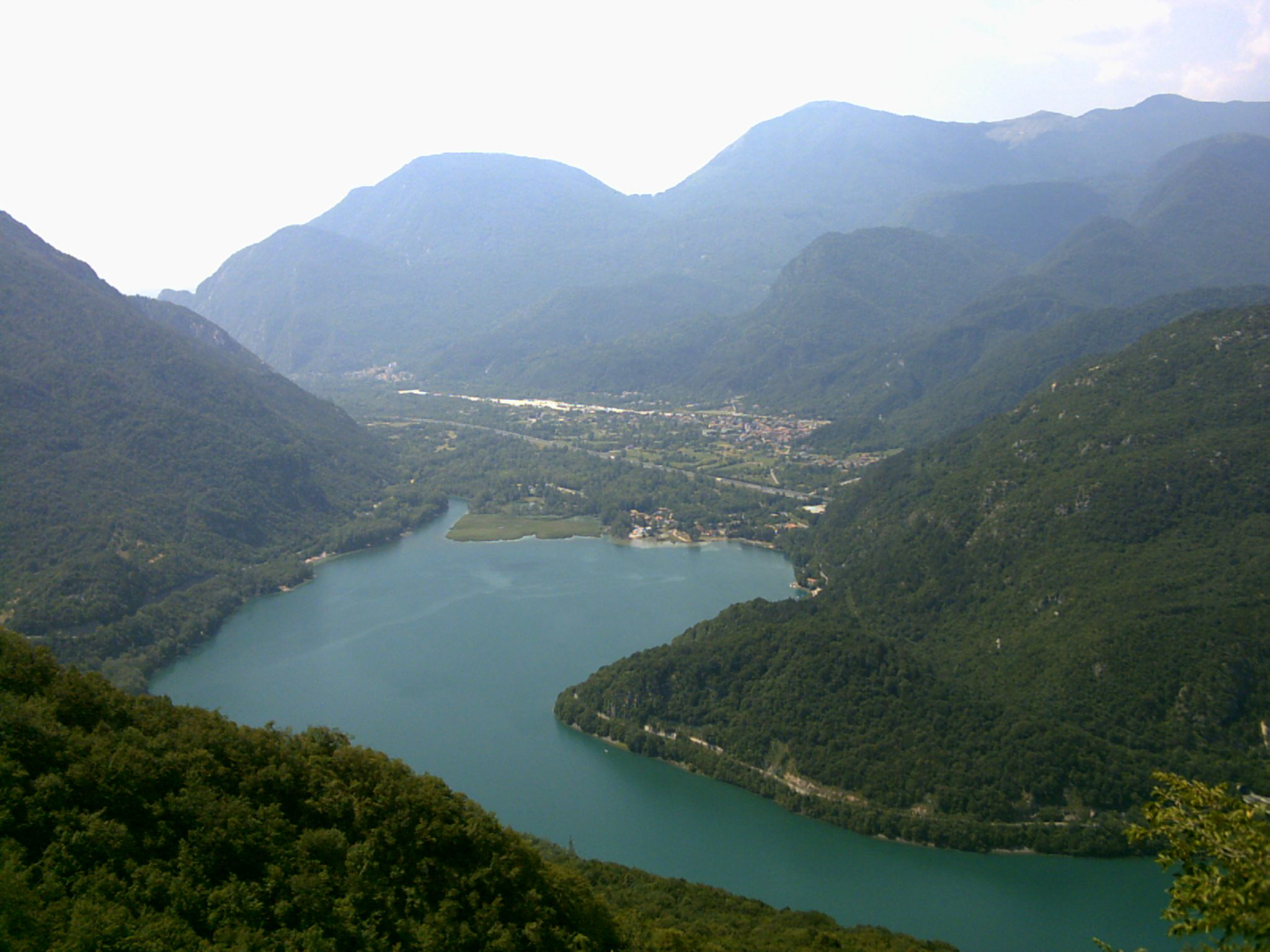 Lago di Cavazzo visto dal monte Festa. Concessa dall'autore Wolfbark sotto